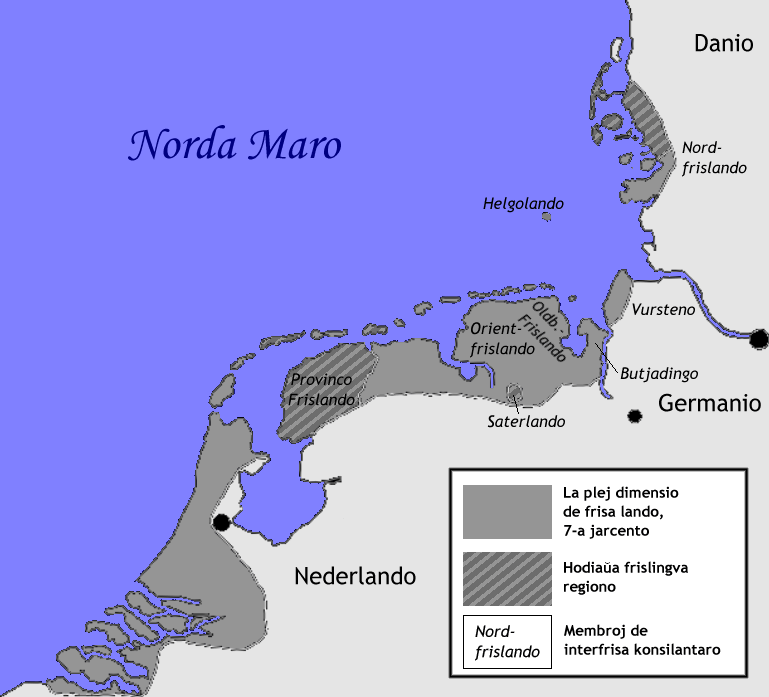 Iama kaj nuna setlejo de la frisoj, hodiaŭa frisa lingva teritorio, membroregionoj de la interfrisa konsilantaro (priskribo en Esperanto).